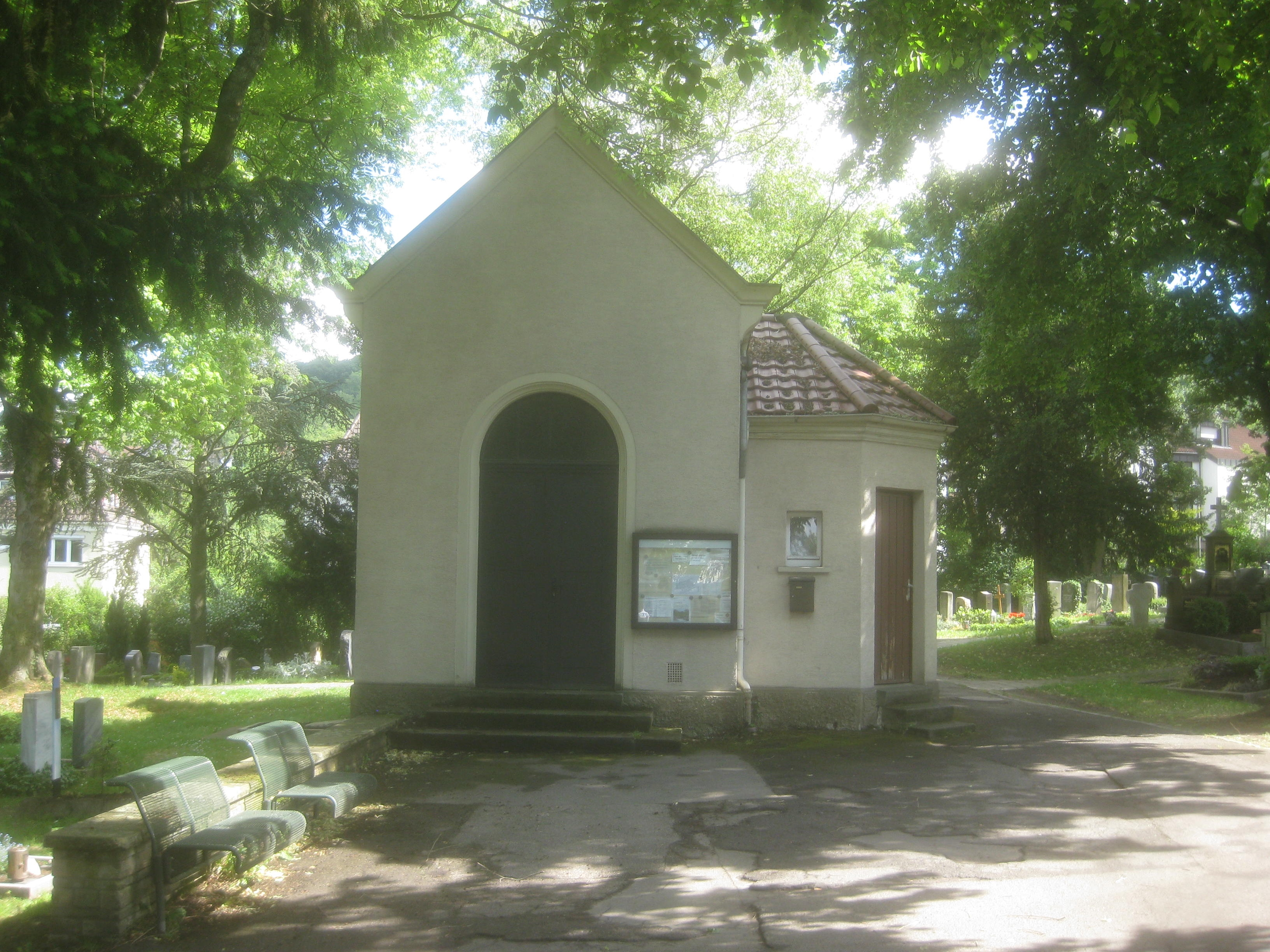 Altes Leichenhaus im Friedhof Gaisburg in Stuttgart.